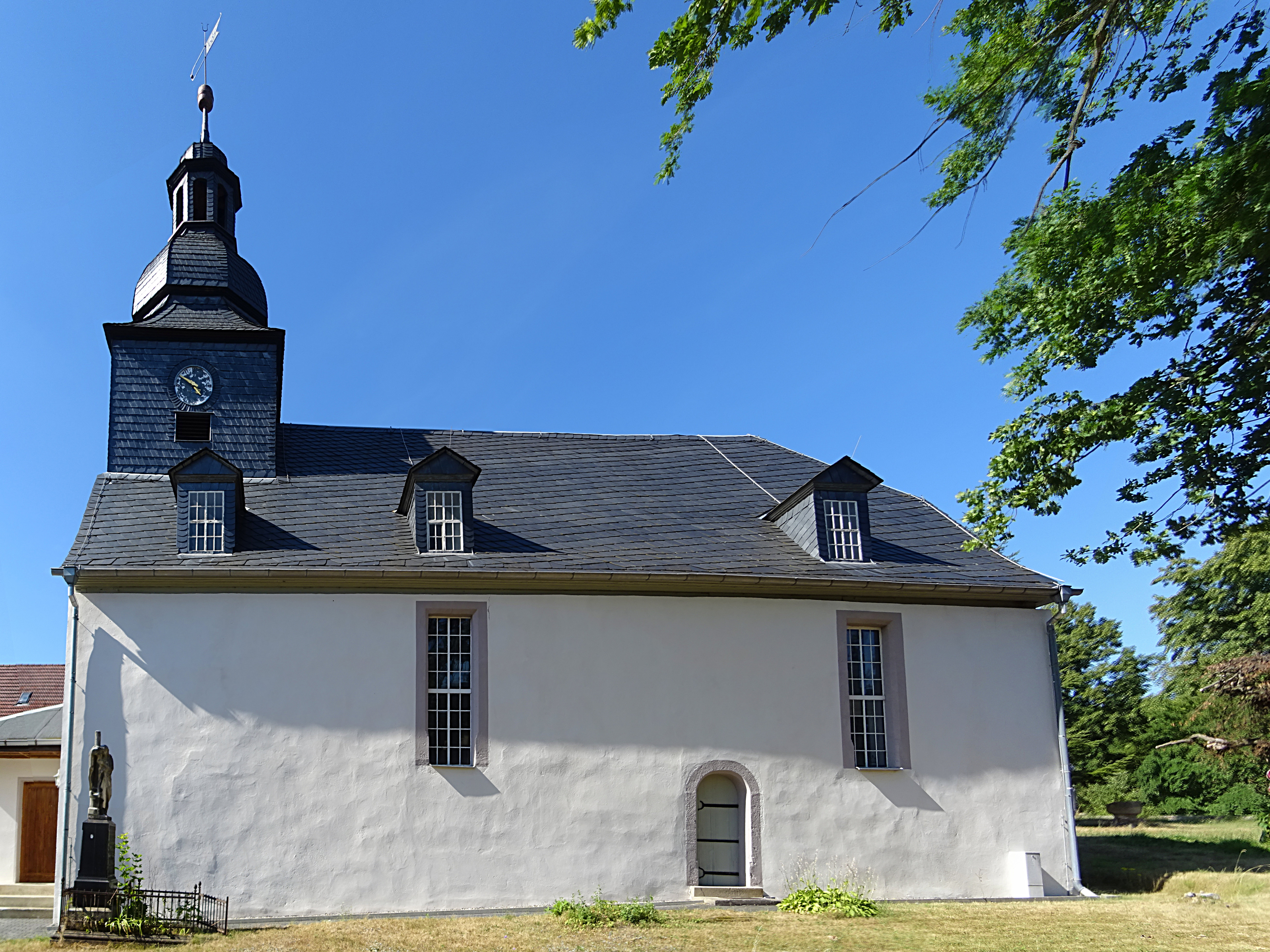 Kirche St. Jakobus (Rottenbach) von Süden